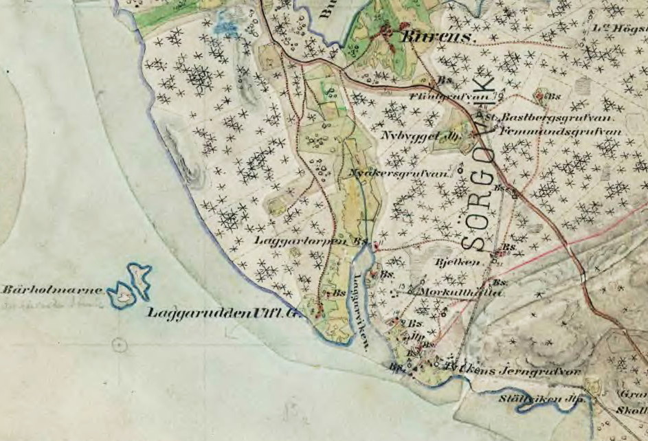 Del av Häradsekonomiska kartan 1866 som visar Laggarudden